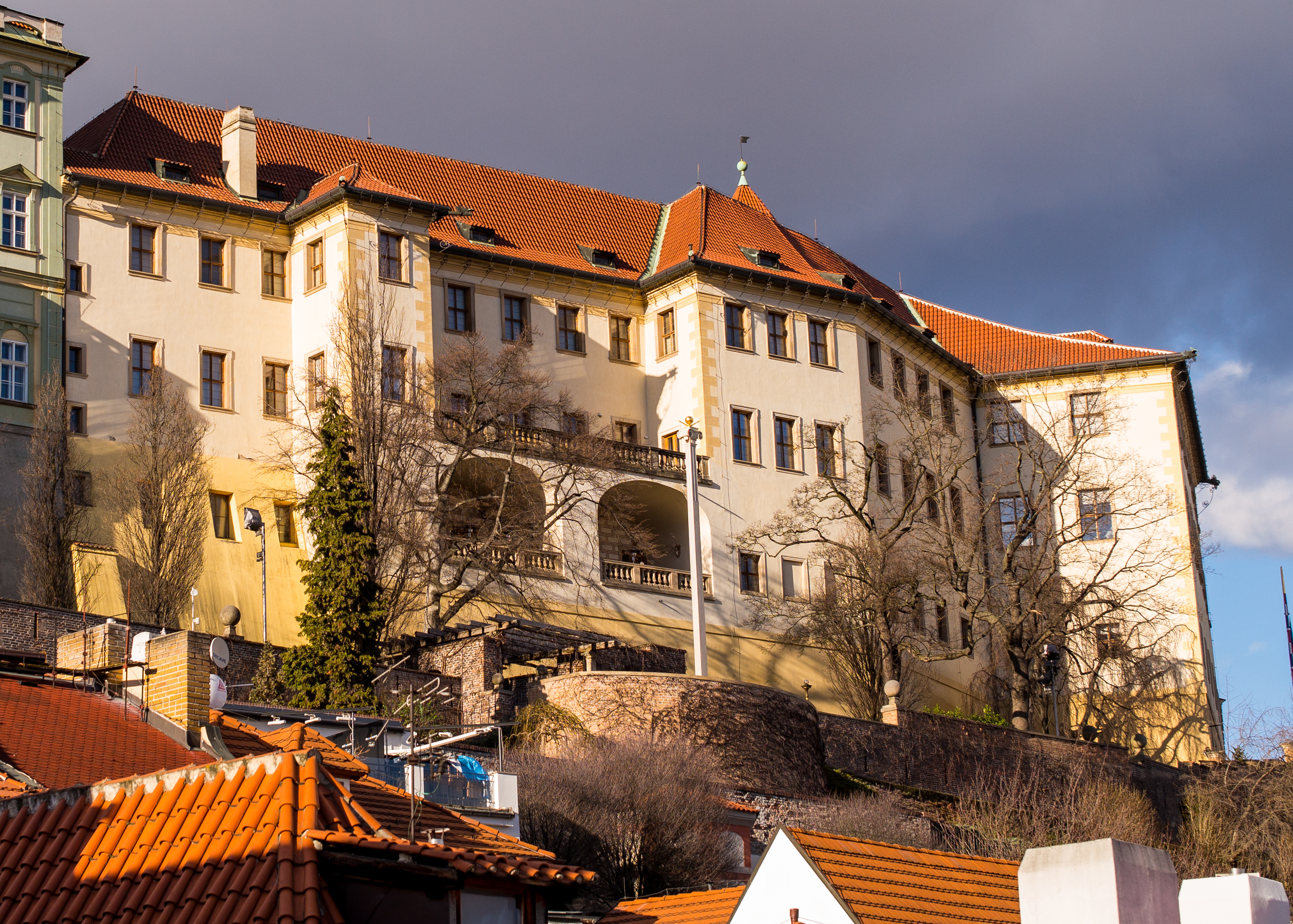 Pražský hrad - Ústav šlechtičen a Lobkowitzský palác, pohled z domu U Turkovy hlavy, Sněmovní 8